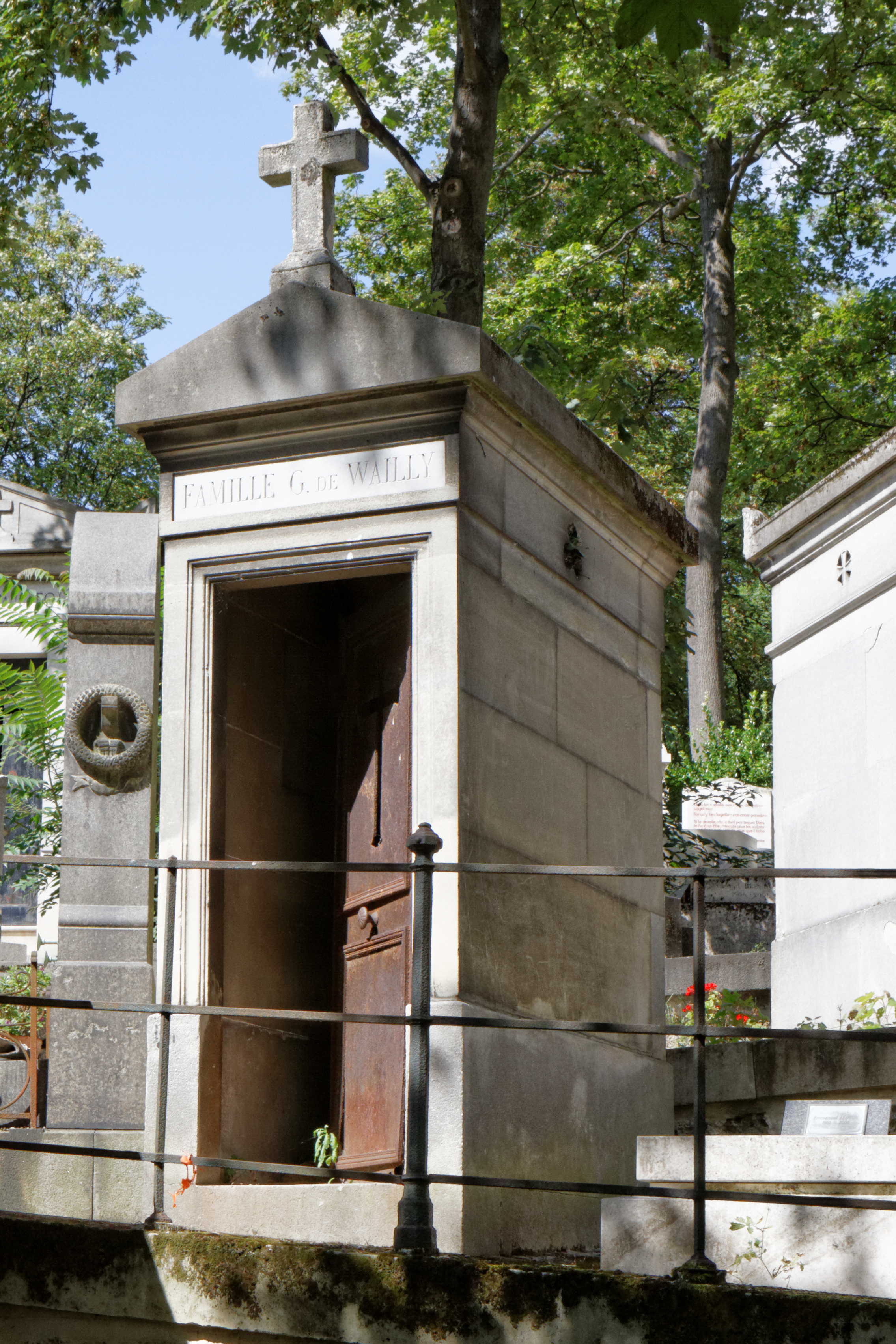 Sépulture de l'auteur dramatique Gustave de Wailly (1804-1878).